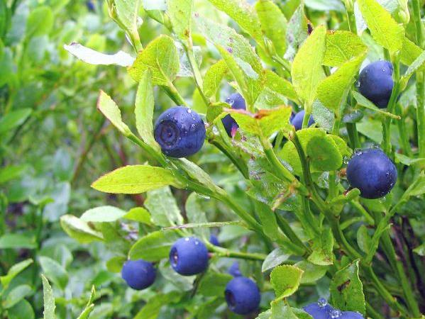 Vaccinium myrtillus in Bieszczady, Polen